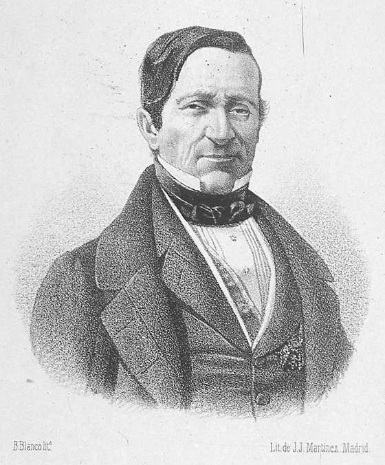 Retrato de Manuel Llauder y Camín (1789-1851), militar y político español.